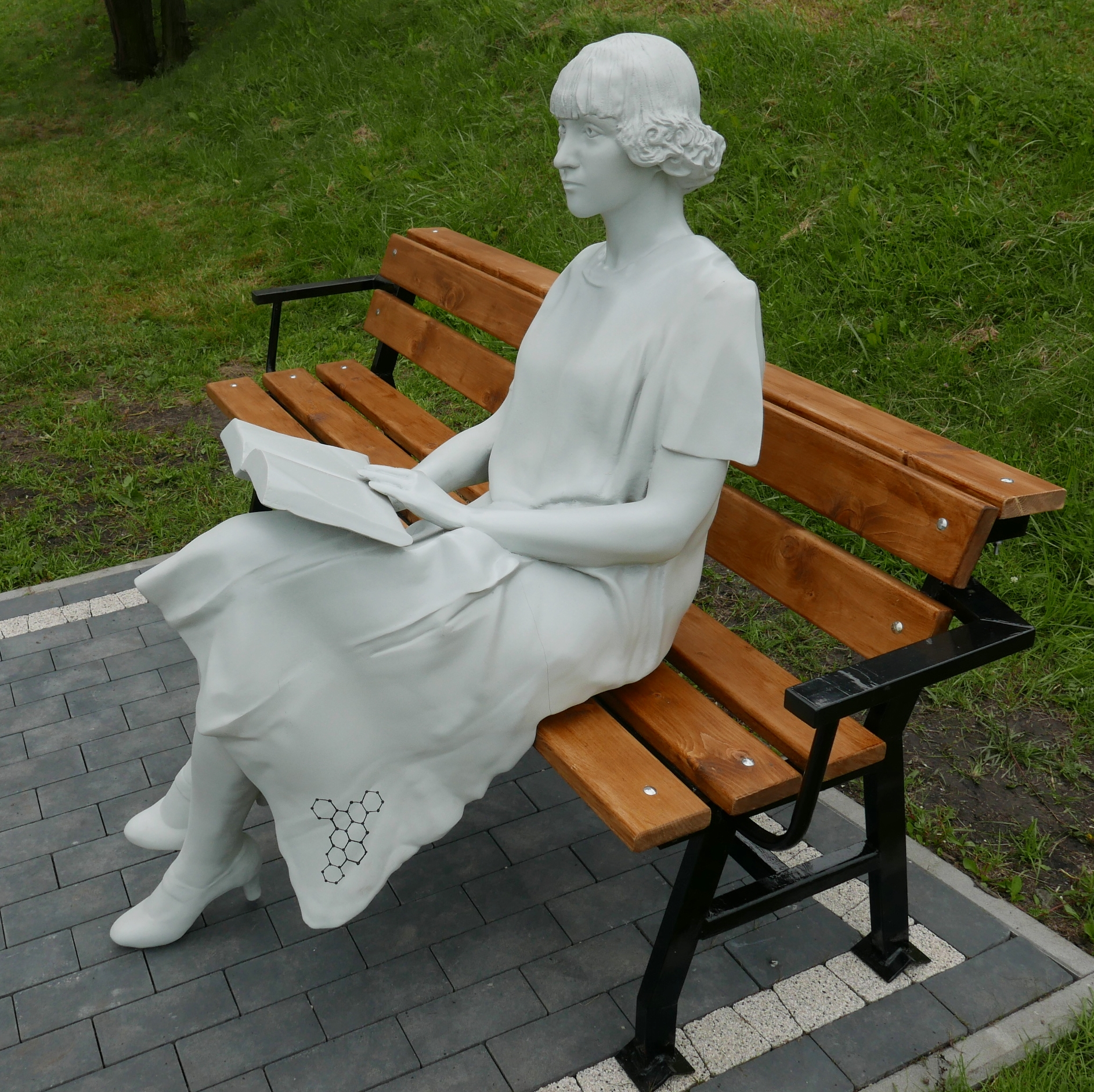 Pomnik Kazimiery Alberti odsłonięty 26 czerwca 2018 na terenie Akademii Techiczno-Humanistycznej w Bielsku-Białej. Wykonany z materiałów polimerowych i grafenu w technologii druku 3D.